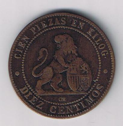 10 CÉNTIMOS 1870, España